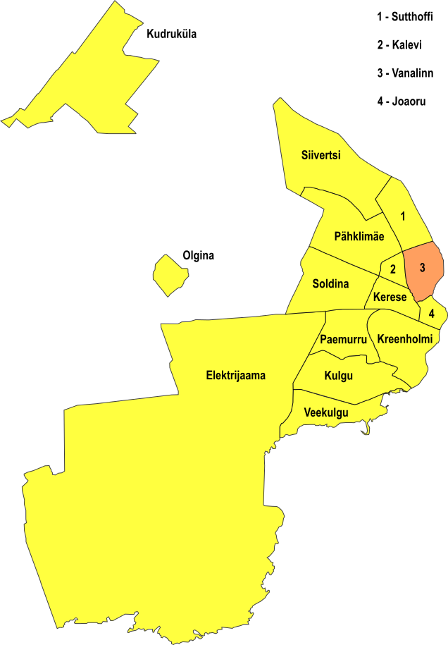 Narva linnaosa Vanalinn